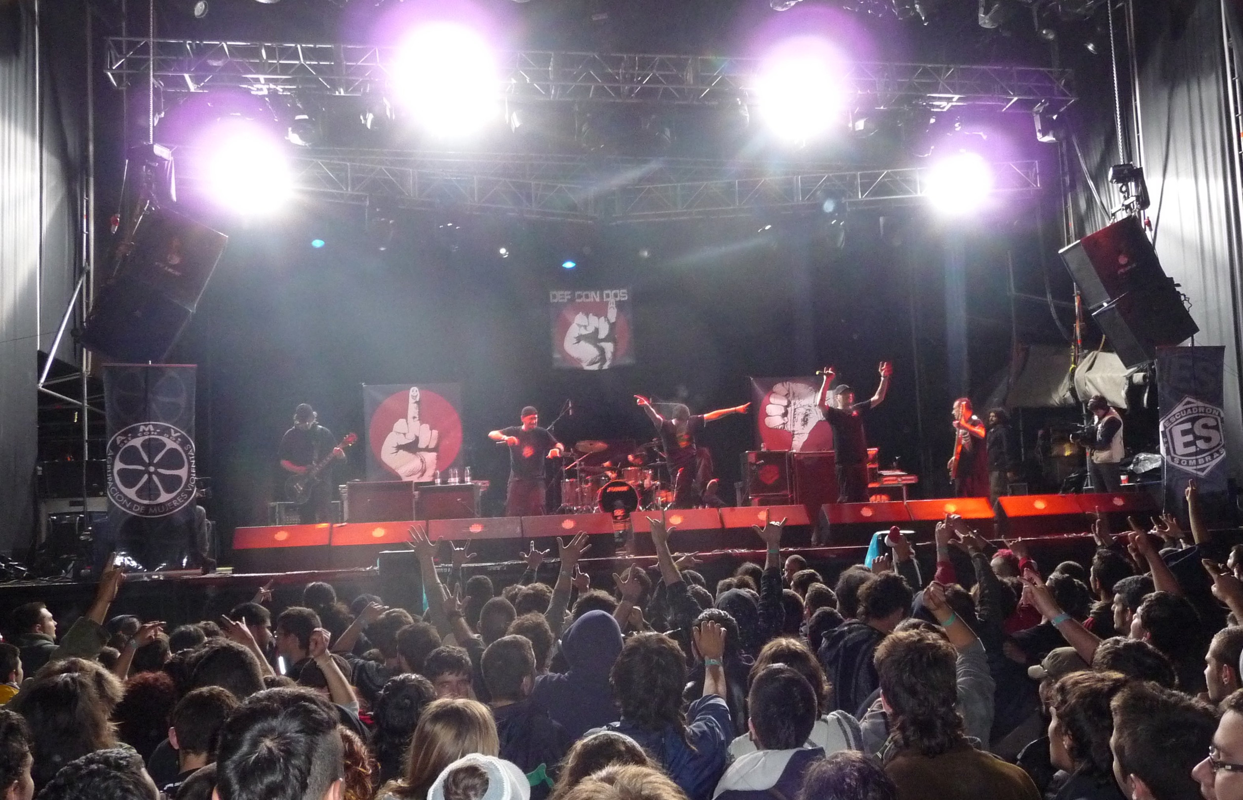 Def Con Dos en Extremúsika 2009